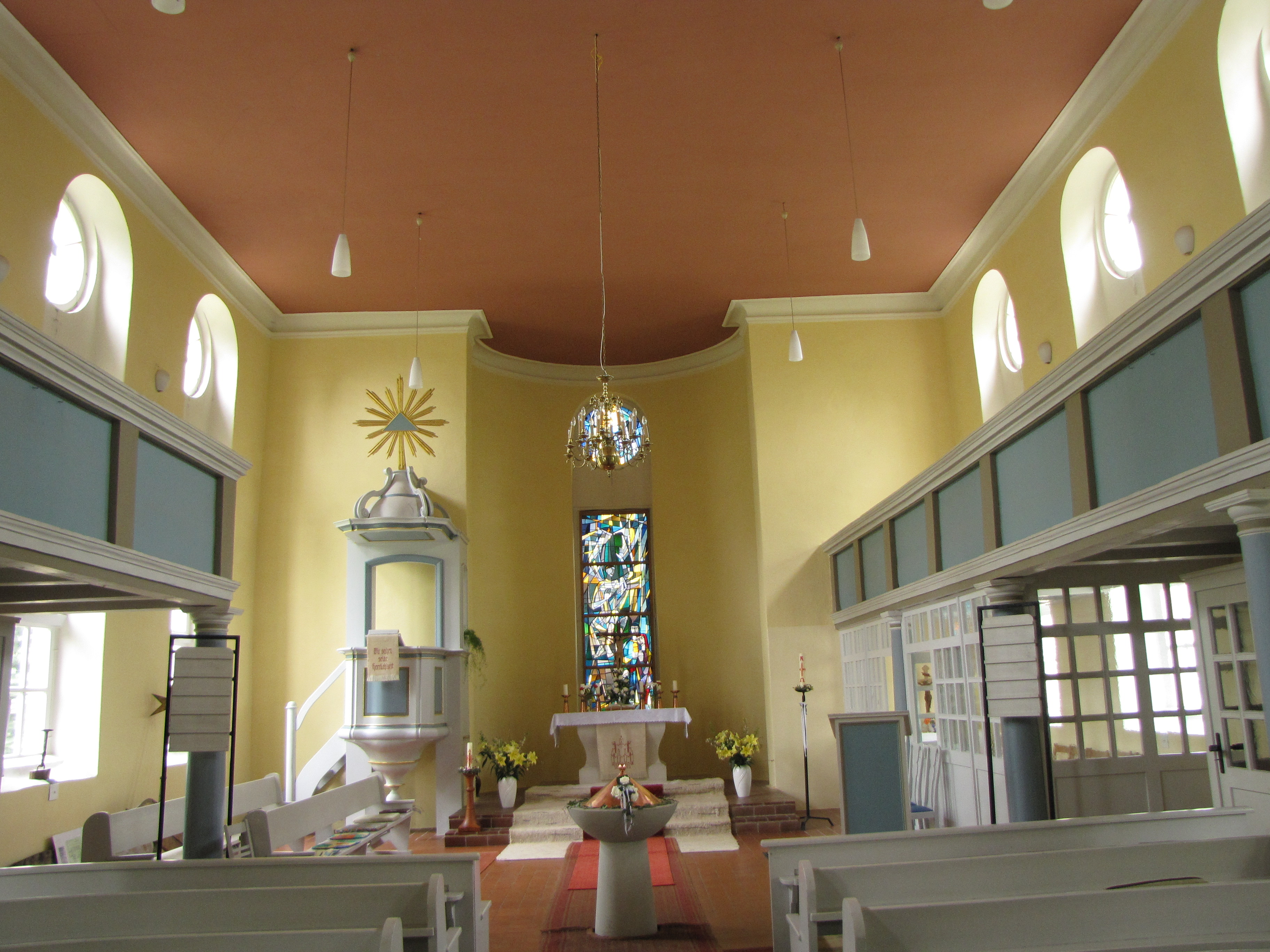 Dorfkirche in Christinendorf, Ludwigsfelde, Brandenburg, Deutschland, Innenraum, Blick nach Osten